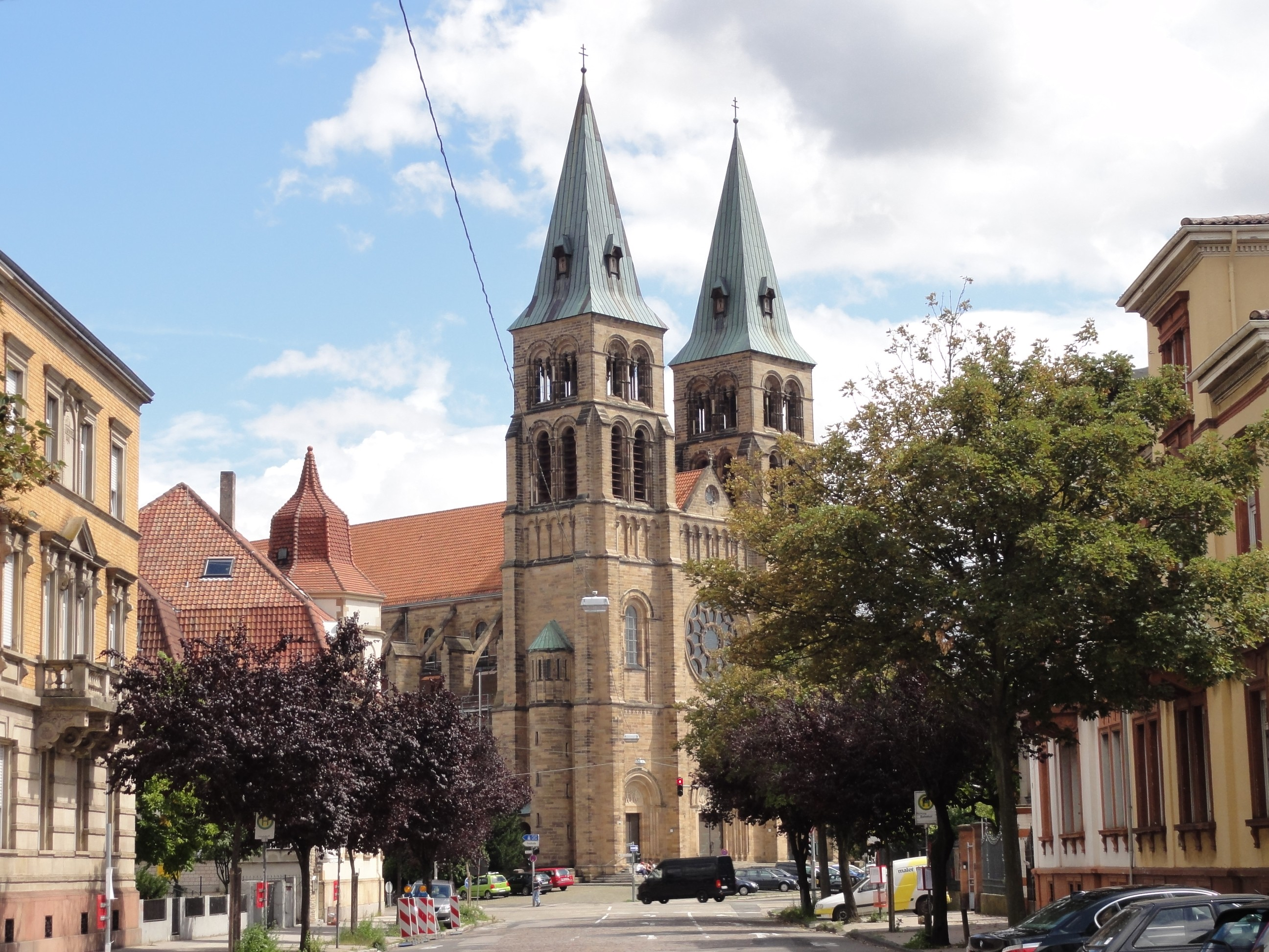 Rheinland-Pfalz, Landau in der Pfalz, Marienkirche